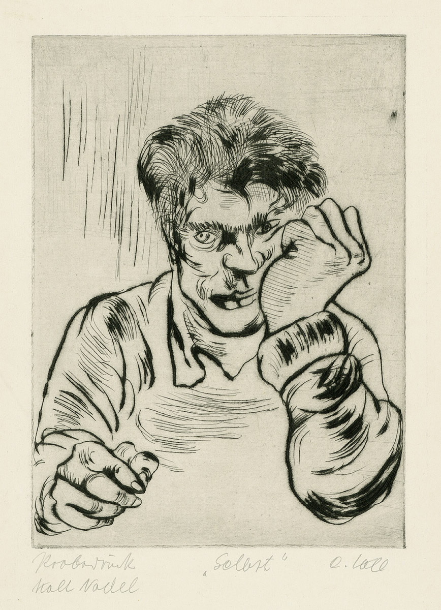 "Selbst". Kaltnadel auf festem Bütten. 27 x 19,5 cm (Plattenrand); signiert, betitelt und vom Künstler als "Probedruck Kaltnadel" bezeichnet